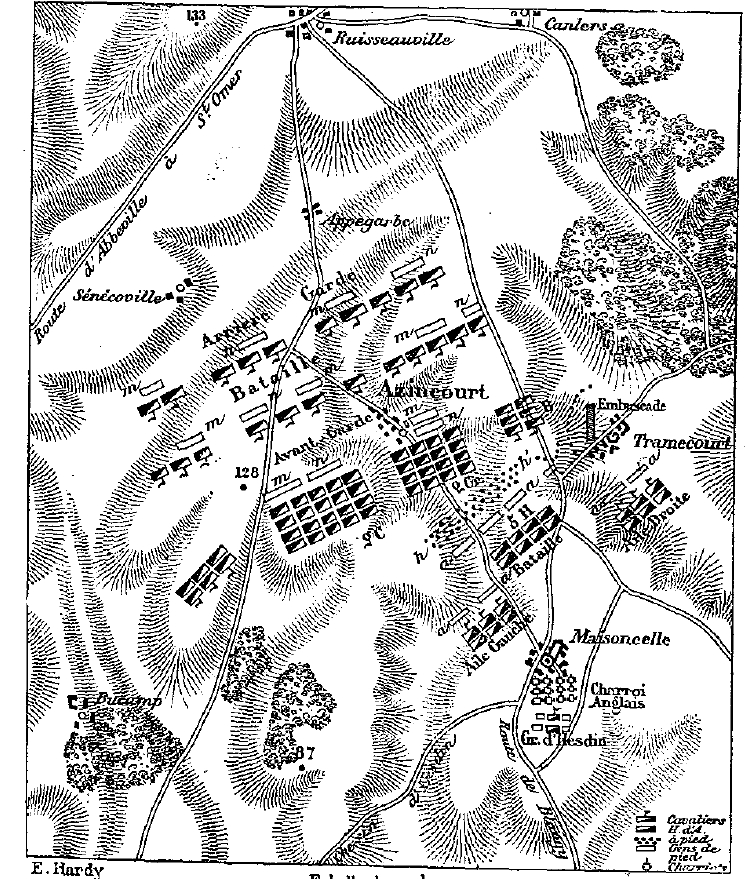 Carte du champs de bataille d'Azincourt avec le positionnement des armées